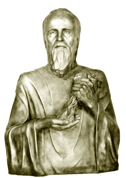 прп. Агапит Печорский, первый русский врач. Скульптурная реконструкция по черепу С.А. Никитина, 1986. Agapetus of the Kiev Caves, Forensic facial reconstruction by S.A.Nikitin.